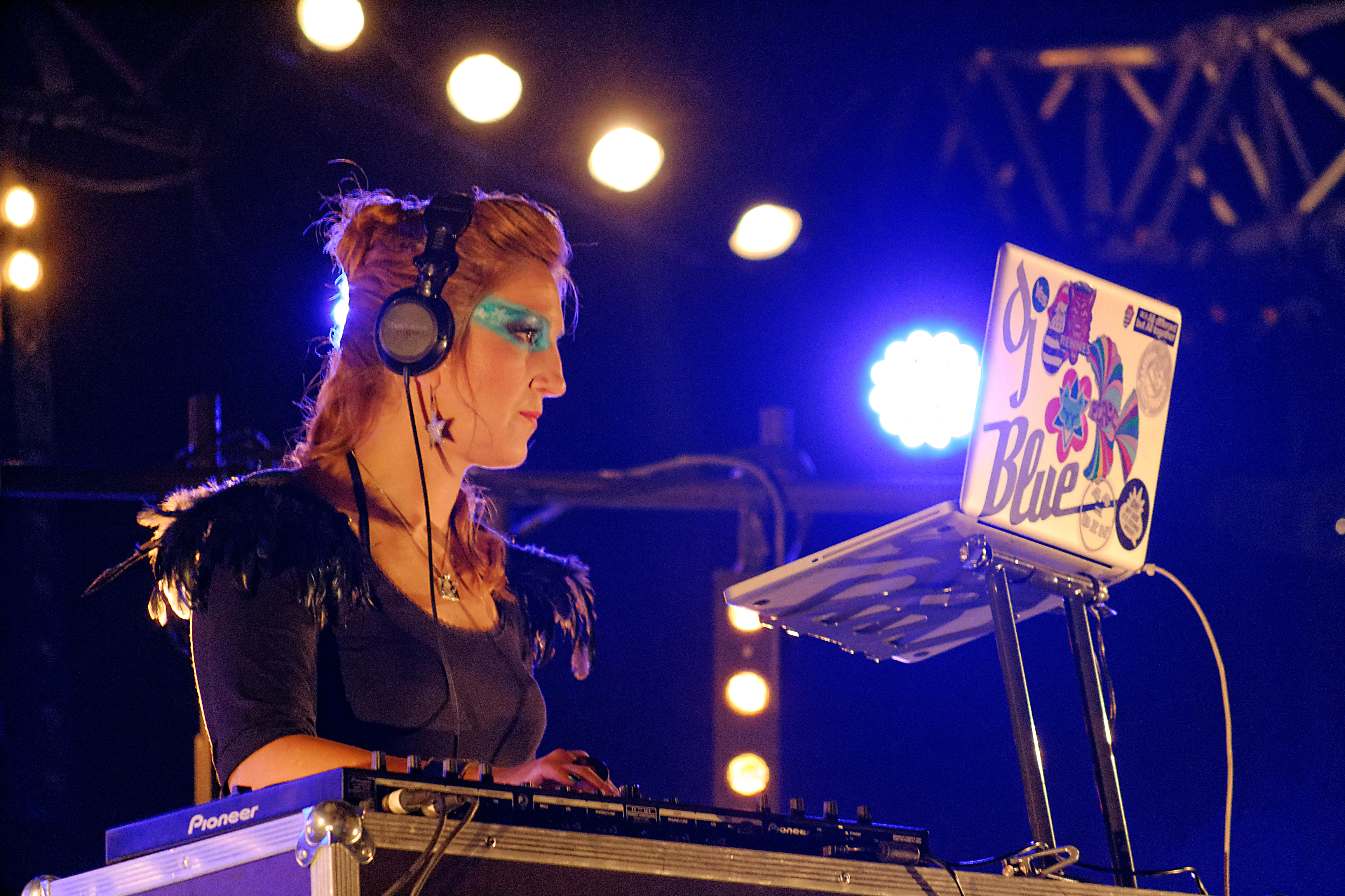 Set de la Dj Miss Blue en conclusion du Stered Festival le 13 Novembre 2015 au Parc des Expos de Langolvas à Morlaix (Finistère, Bretagne).